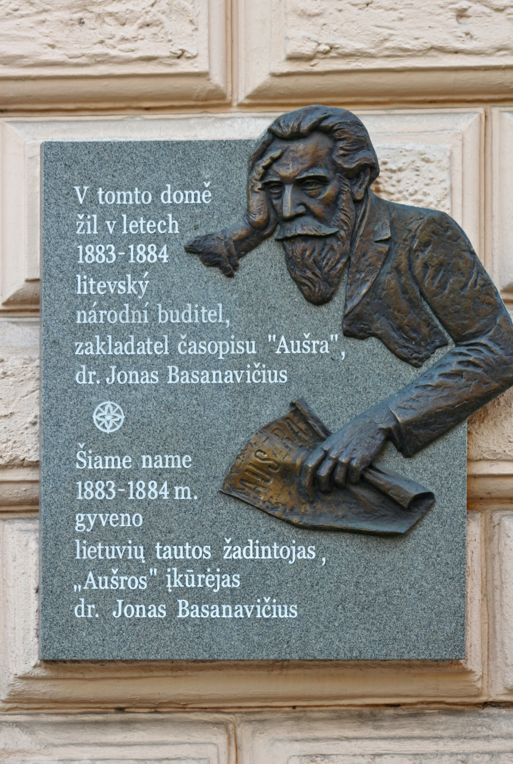 Busta Jonase Basanavičiuse v Praze, Balbínova 529/1, Praha-Vinohrady.